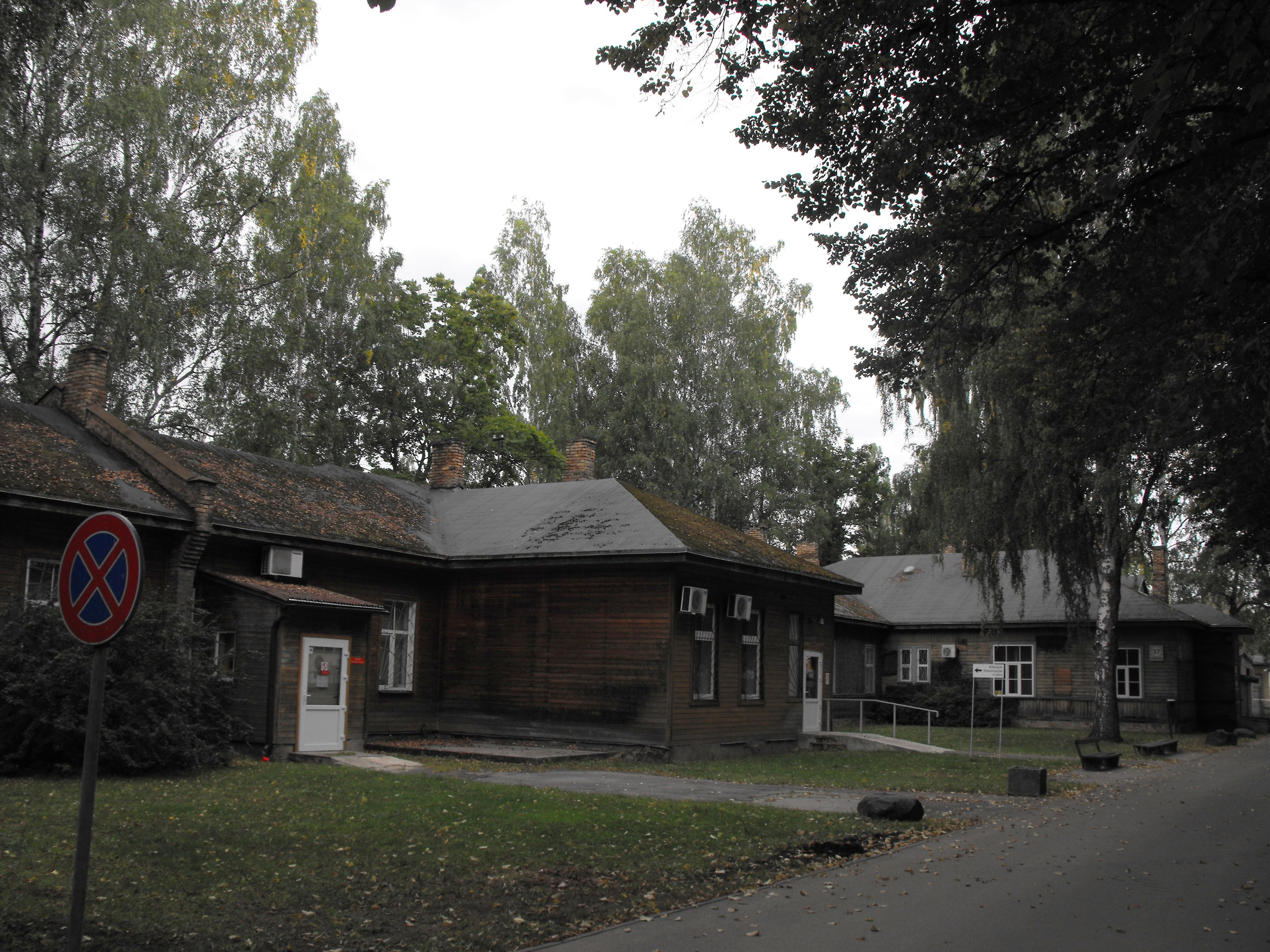 Slimnīcas celtņu komplekss, Rīga, Pilsoņu iela 13